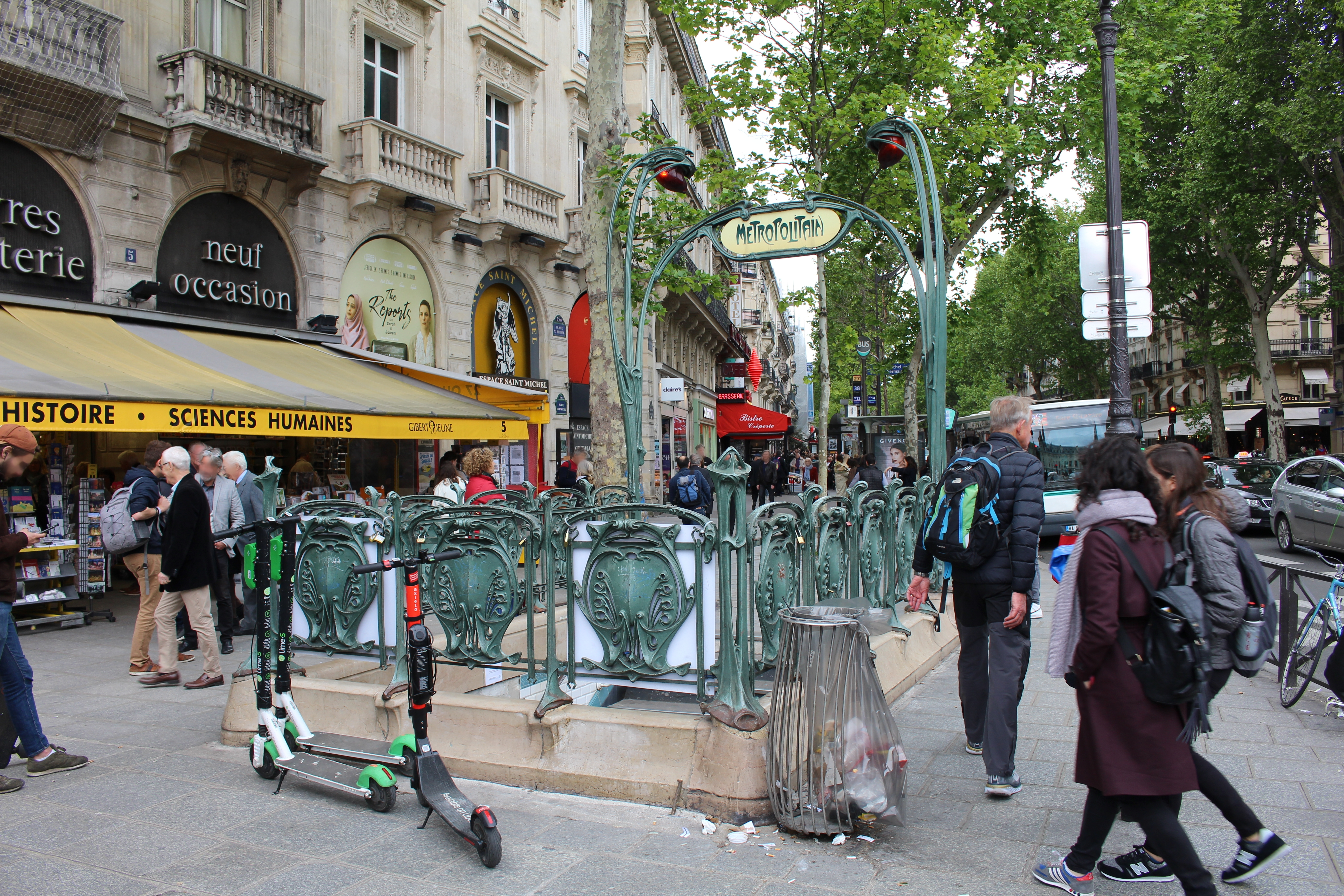 Entrée de la station de métro Saint-Michel le long du boulevard Saint-Michel, Paris.